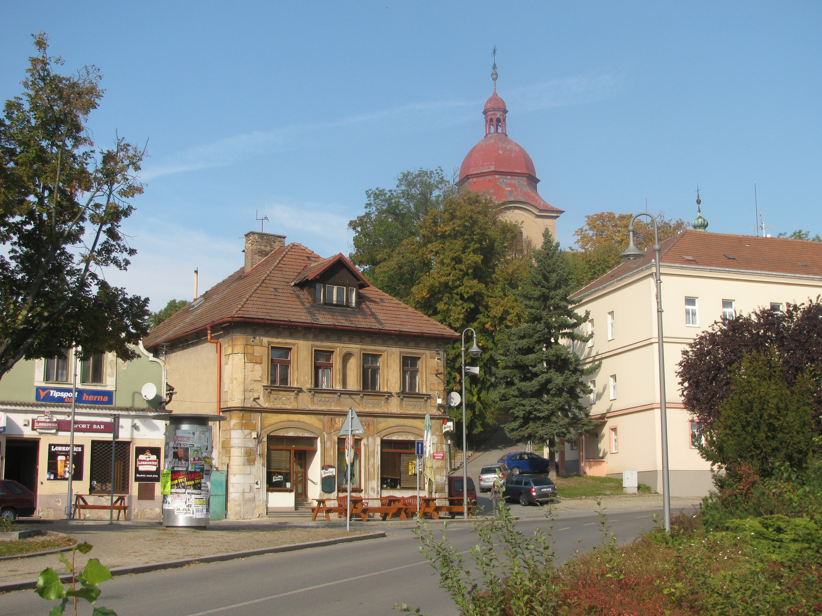 Část severní fronty domů Palackého nám. v Dobrovici, cesta ke kostelu sv. Bartoloměje, jeho věž v pozadí